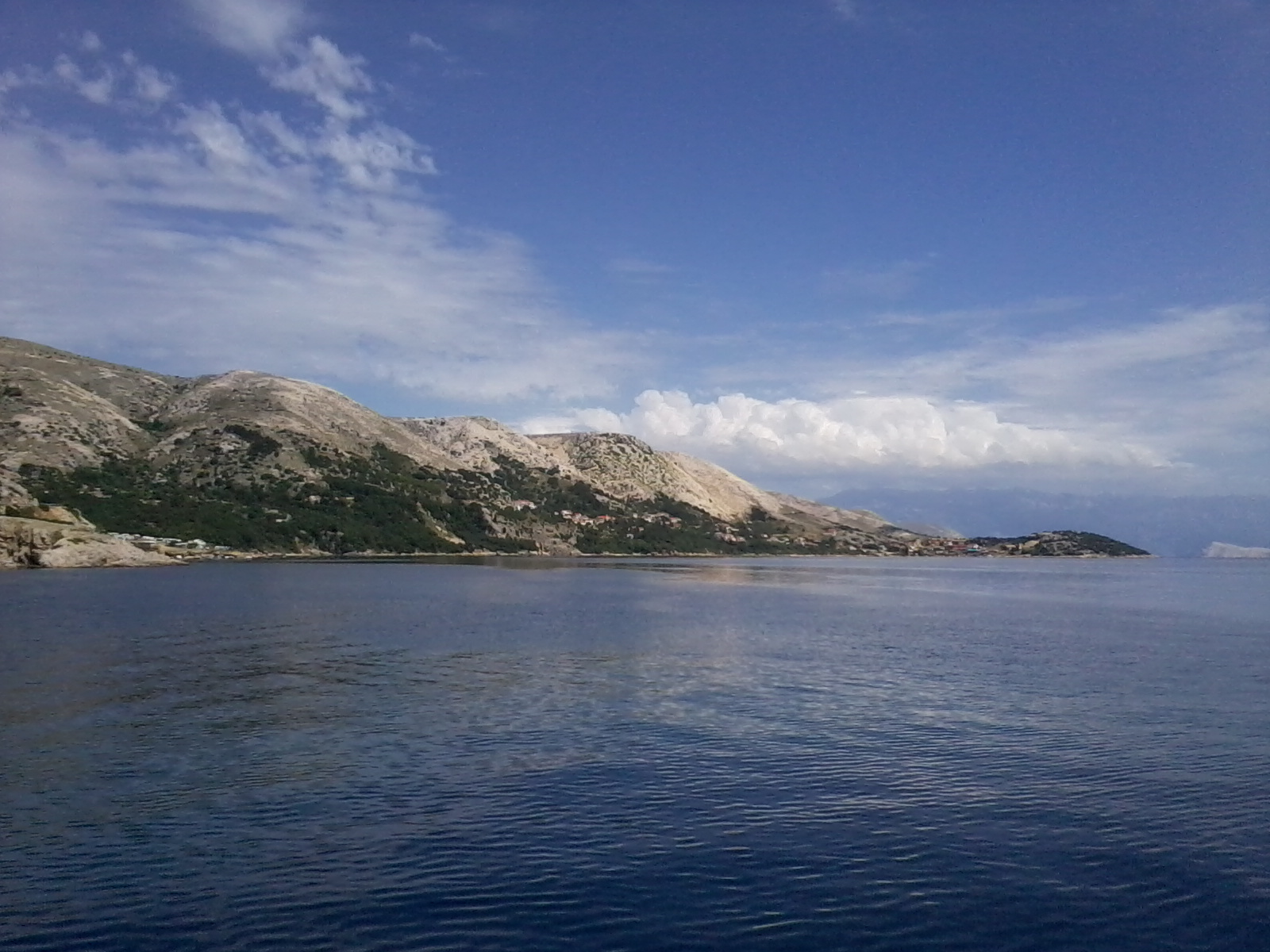 Stara Baška slikana s mora, sa sjeverozapadne strane.